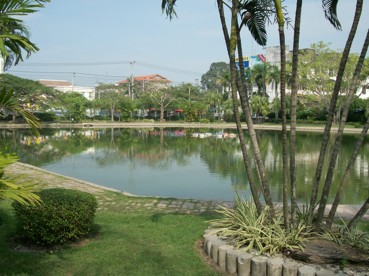 สวนสาธารณะหนองจอก Nongchock Park